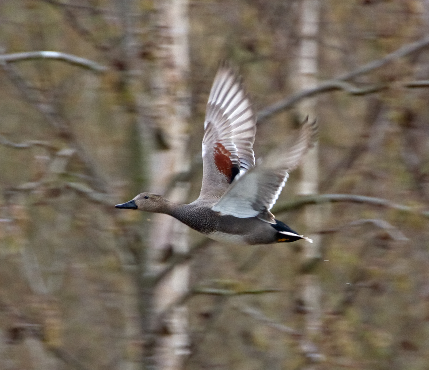 Gadwall flying past